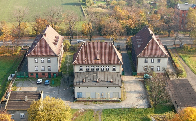 Gliwice - budynki radiostacji z 55 metra wieży